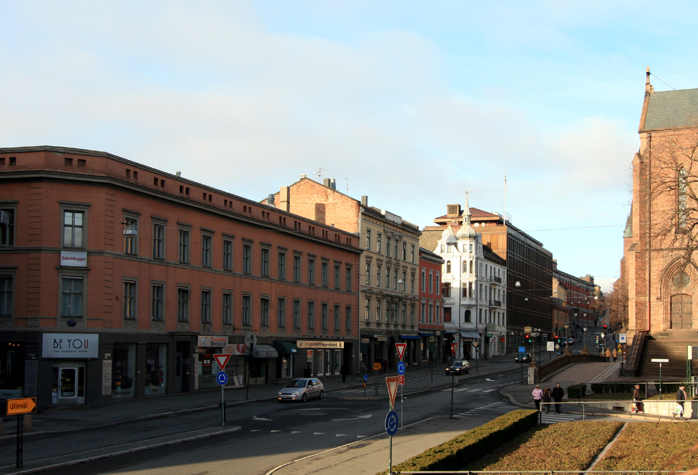 Akersgata, Oslo, mot nord. Til venstre Maltheby, til høyre Trefoldighetskirken.